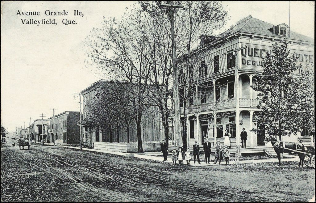 Avenue Grande Île, Valleyfield, Que.